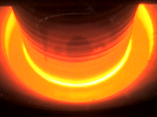 Вирощування монокристалів методом Чохральського. Витягування монокристалу з розплаву